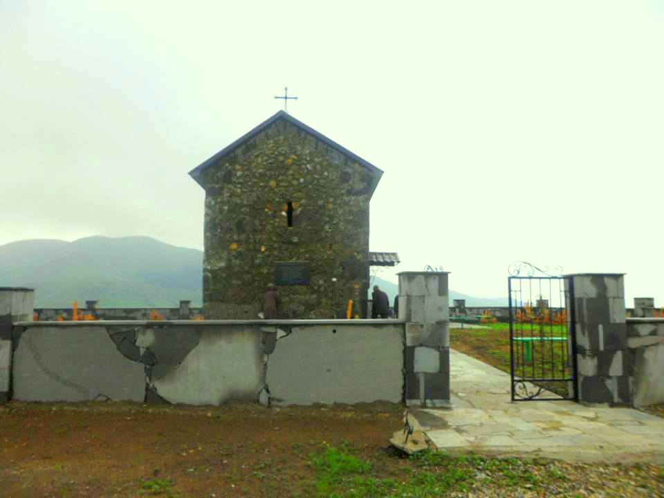 Մատուռը վերանորագվել է 2011թ.-ին՝ Միշա Ղարաքեշիշյանի բարերարությամբ